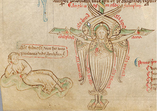 Bendiktinský mnich a serafin